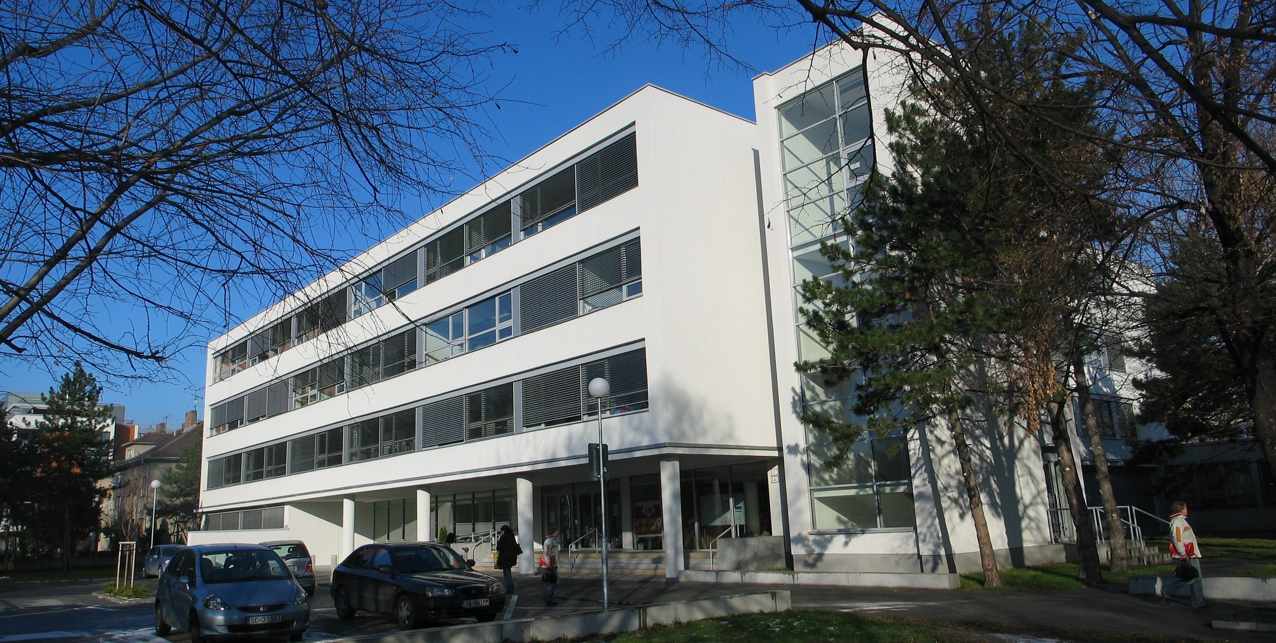 Ústav ekonomiky a organizácie stavebníctva v Bratislave, (1963 - 1965)